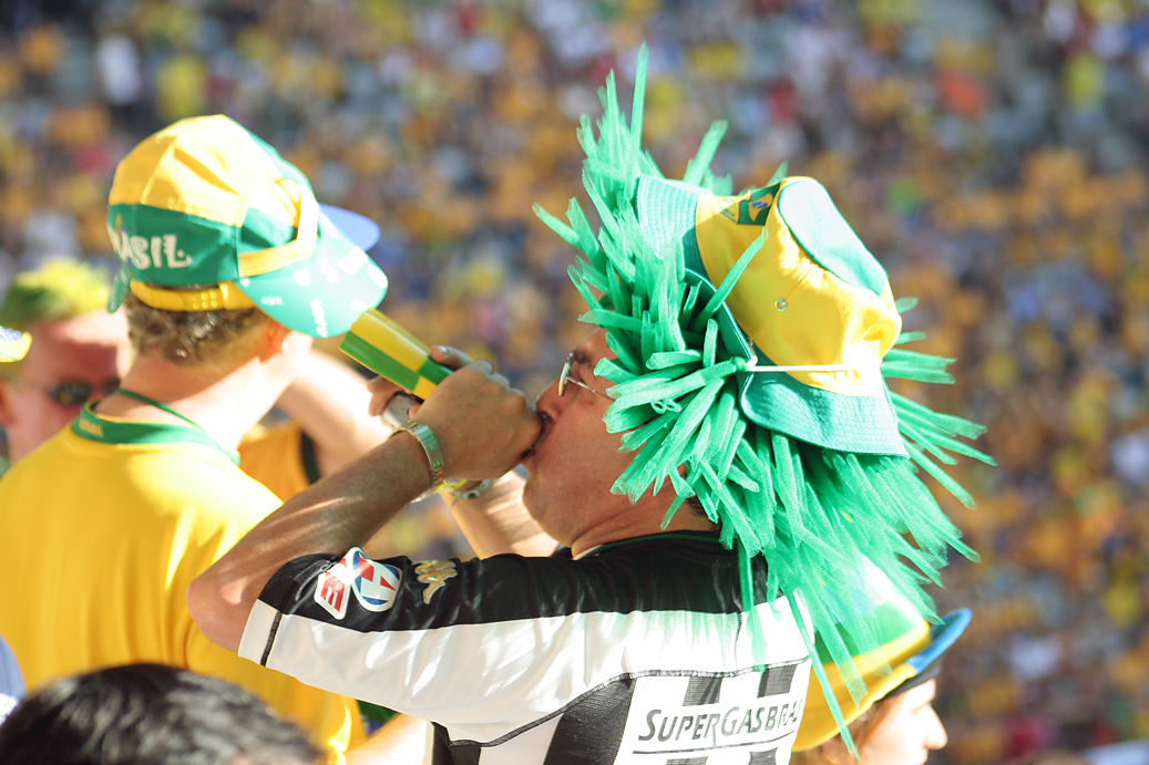 Torcedor brasileiro numa partida de futebol